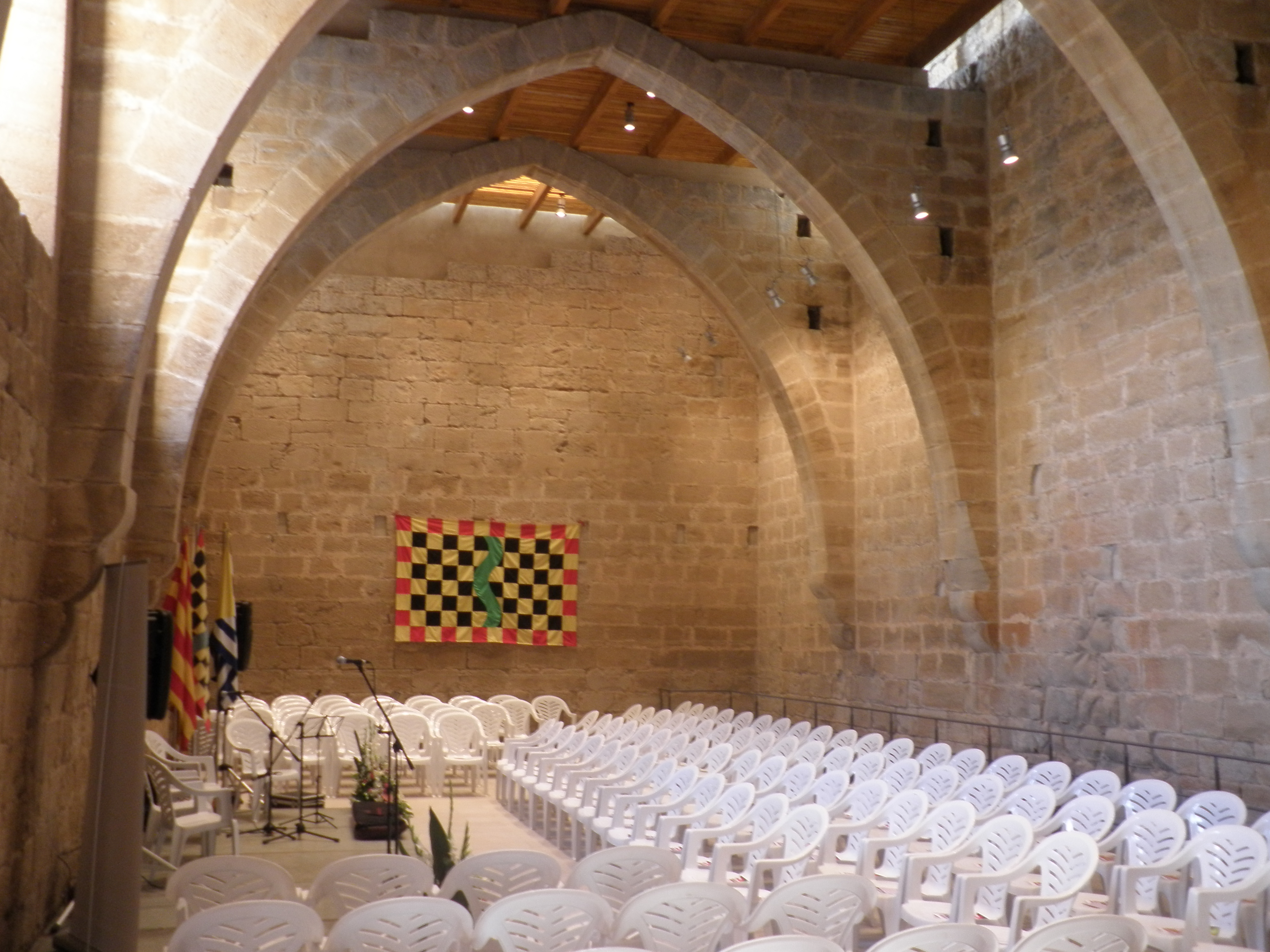 Castell de Maldà preparat per un acte.